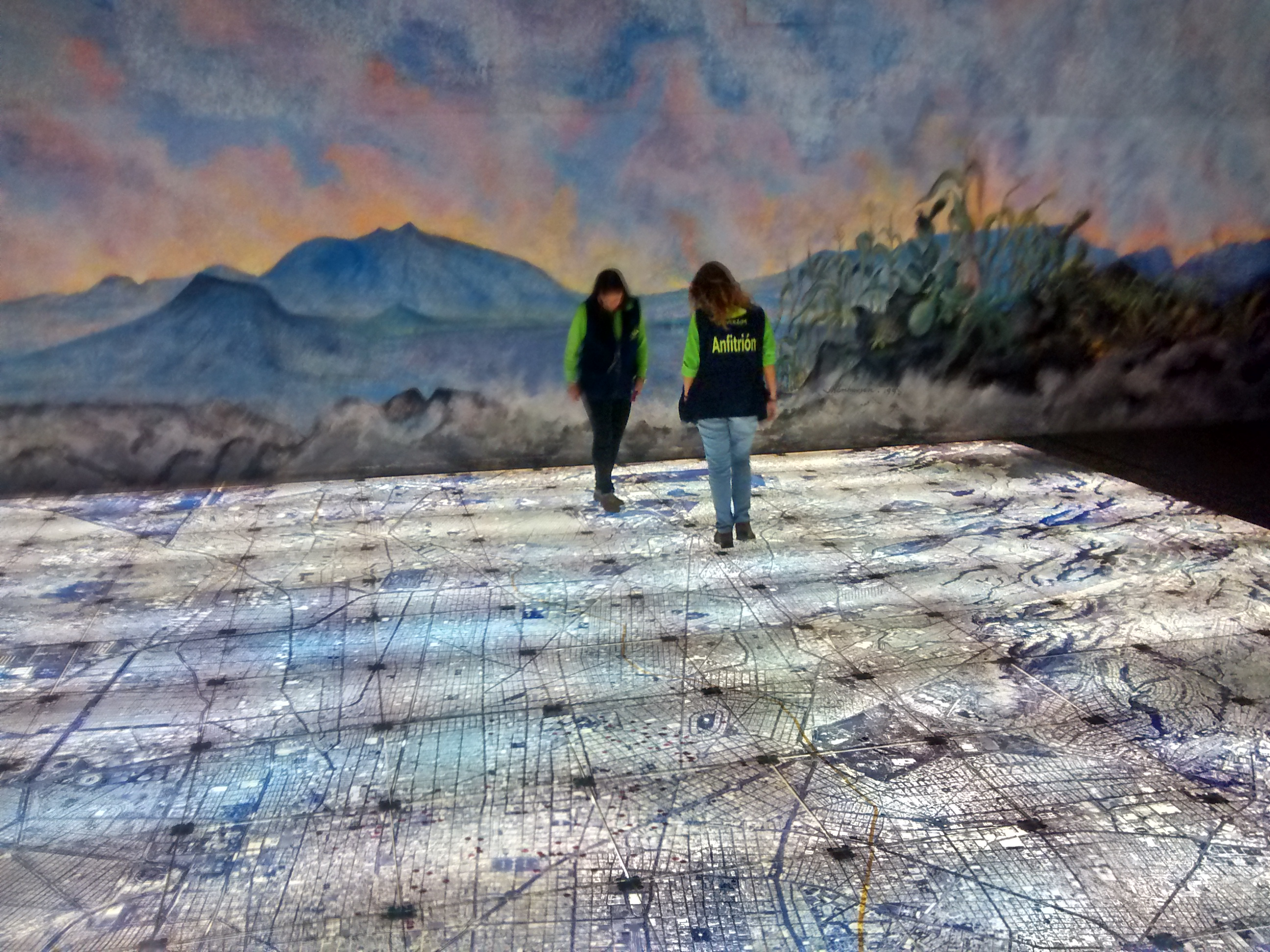 Anfitriones de Universum en Sala Conciencia de Nuestra Ciudad.